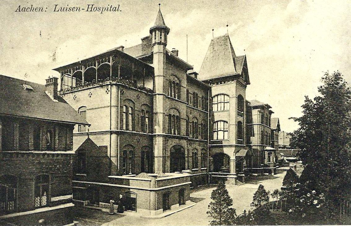 Ansicht Luisenhospital Aachen vor 1920